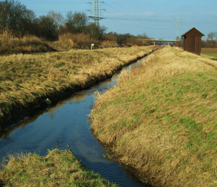 Mündung der Auer in den Winkelbach